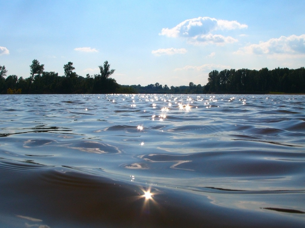 Чулым